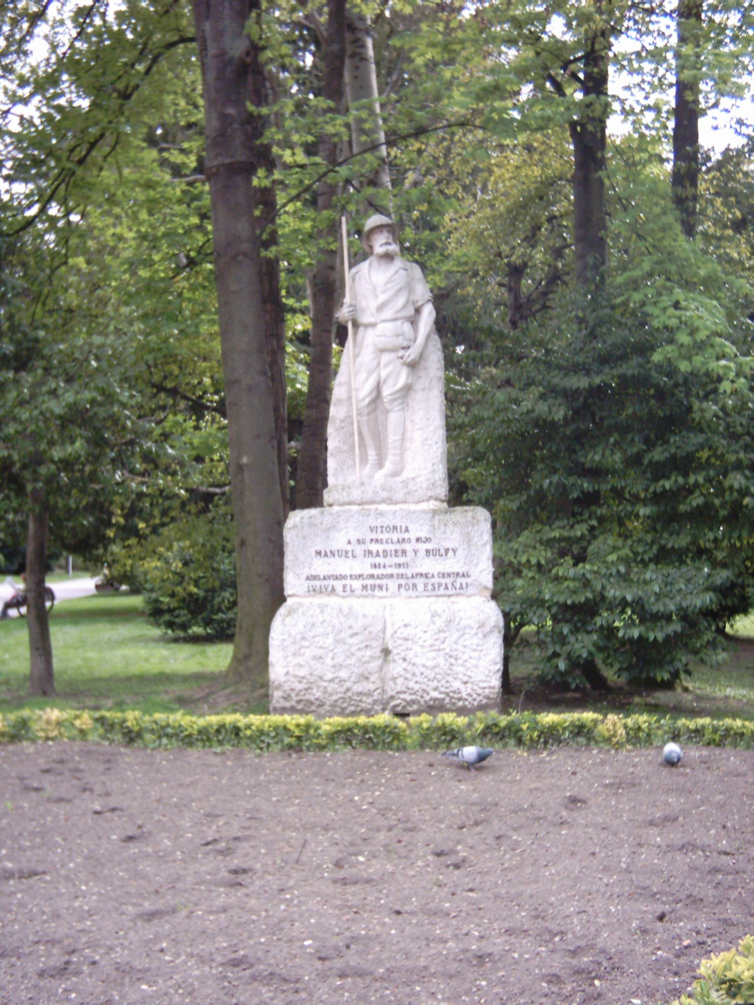 Estatua de Manuel Iradier en Vitoria